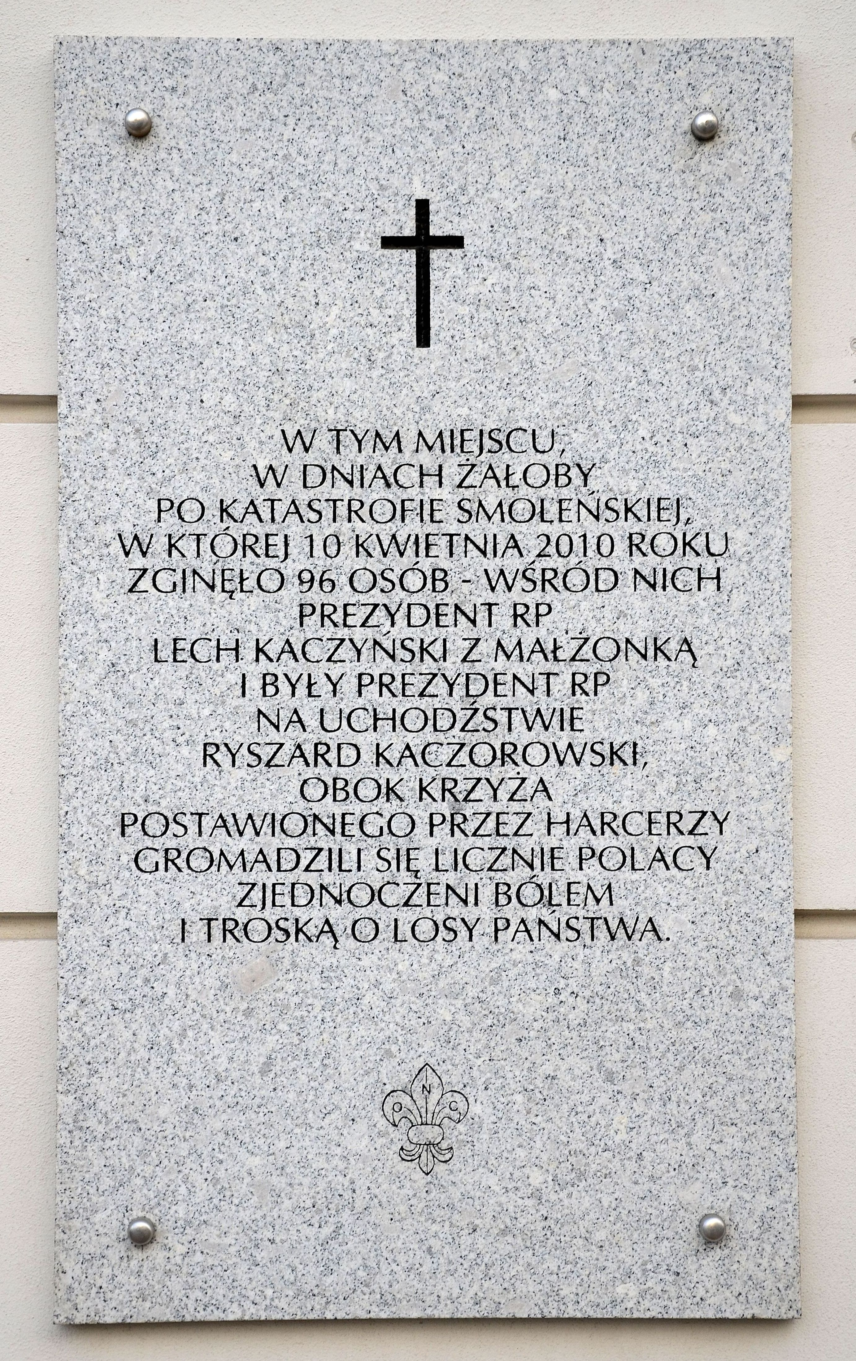 Tablica upamiętniająca ofiary katastrofy smoleńskiej na fasadzie Pałacu Prezydenckiego w Warszawie